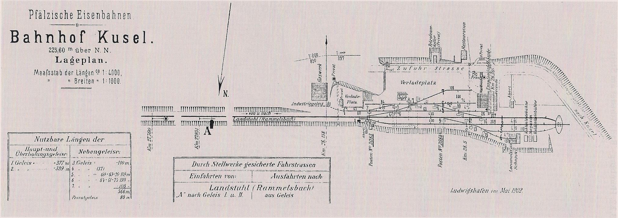 Gleisplan des Bahnhof Kusel 1902